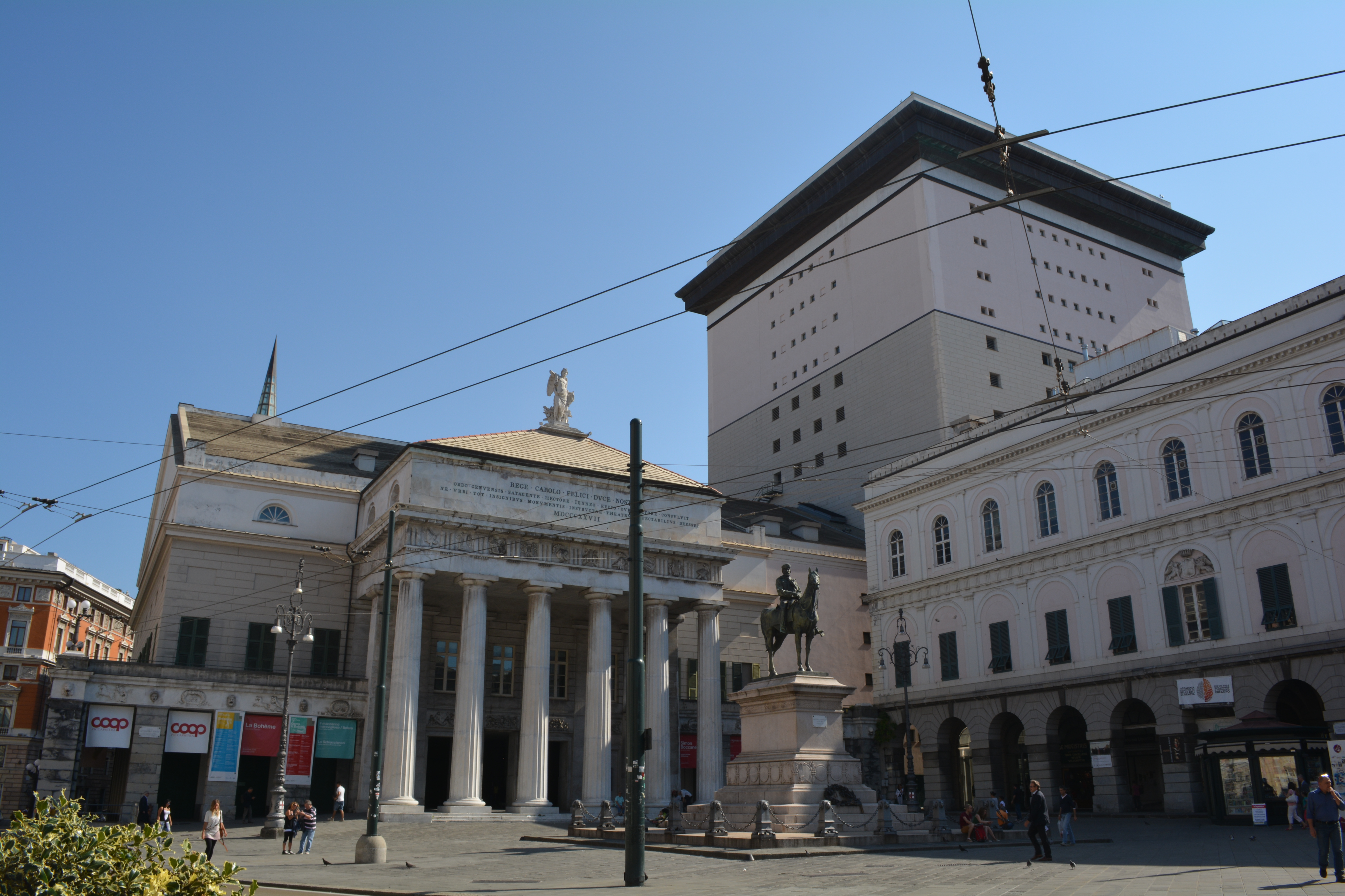 Teatro Carlo Felice This is a photo of a monument which is part of cultural heritage of Italy.